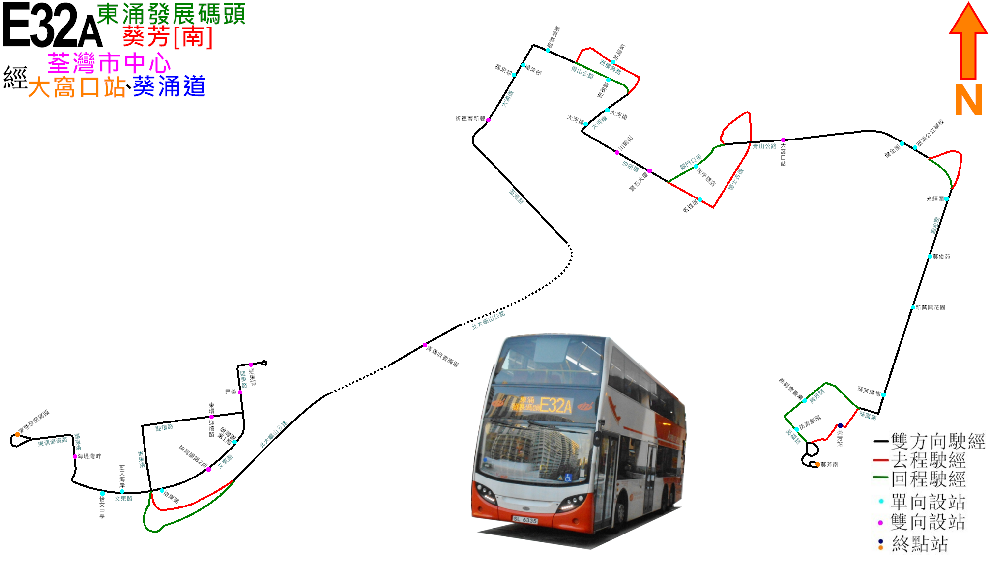 中文（香港）: 龍運巴士E32A線的走線圖